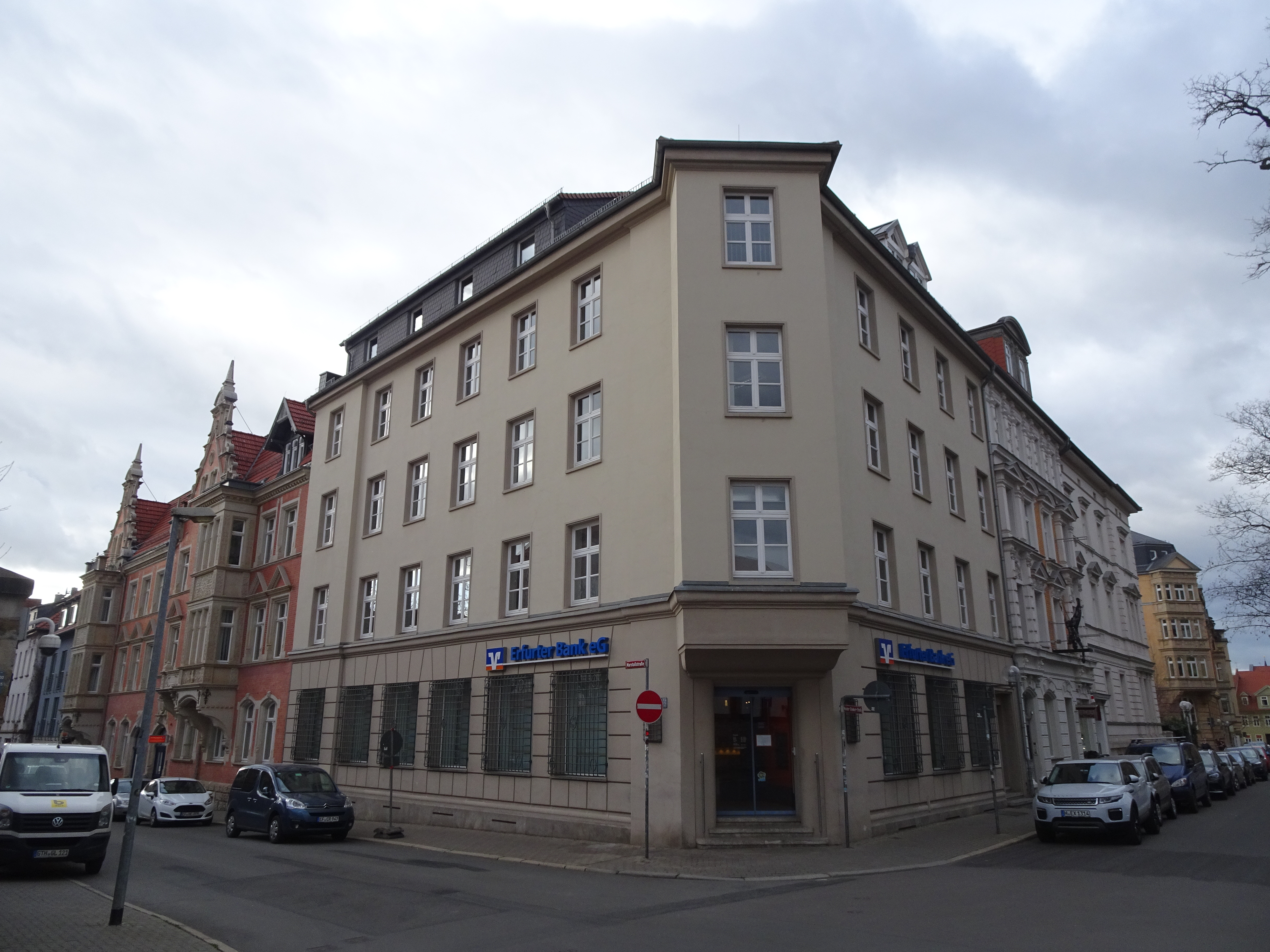 Erfurter Bank, Marstallstraße Ecke Meister-Eckehard-Straße